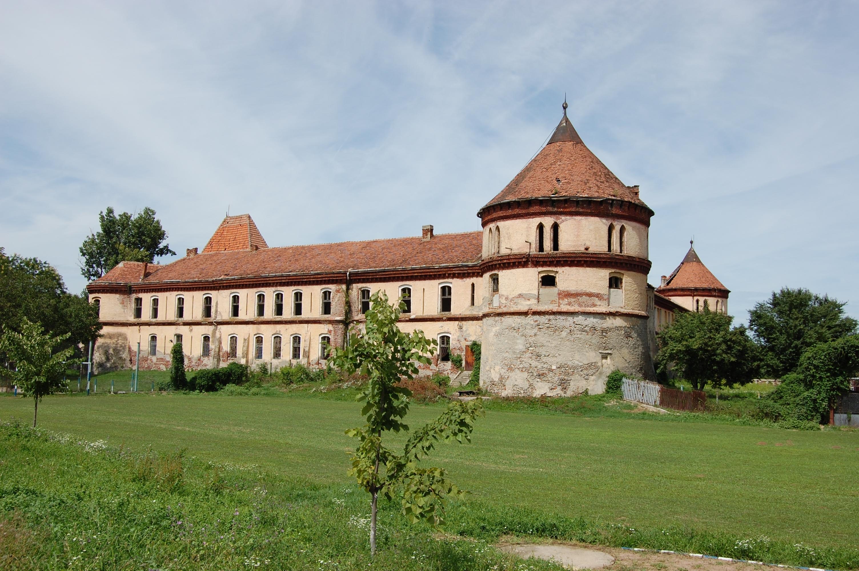 Borosjenő - Vár